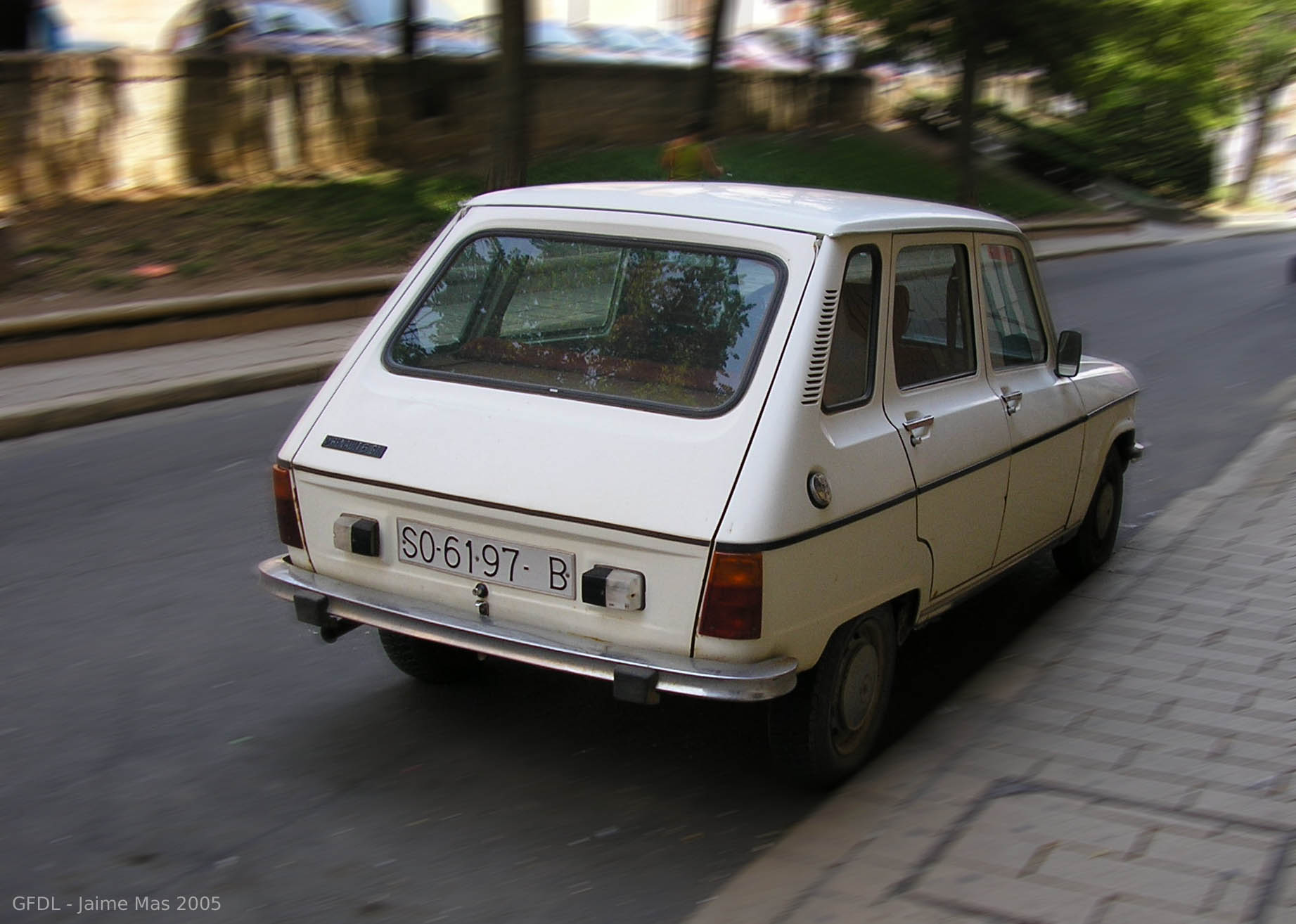 Renault 6 GL